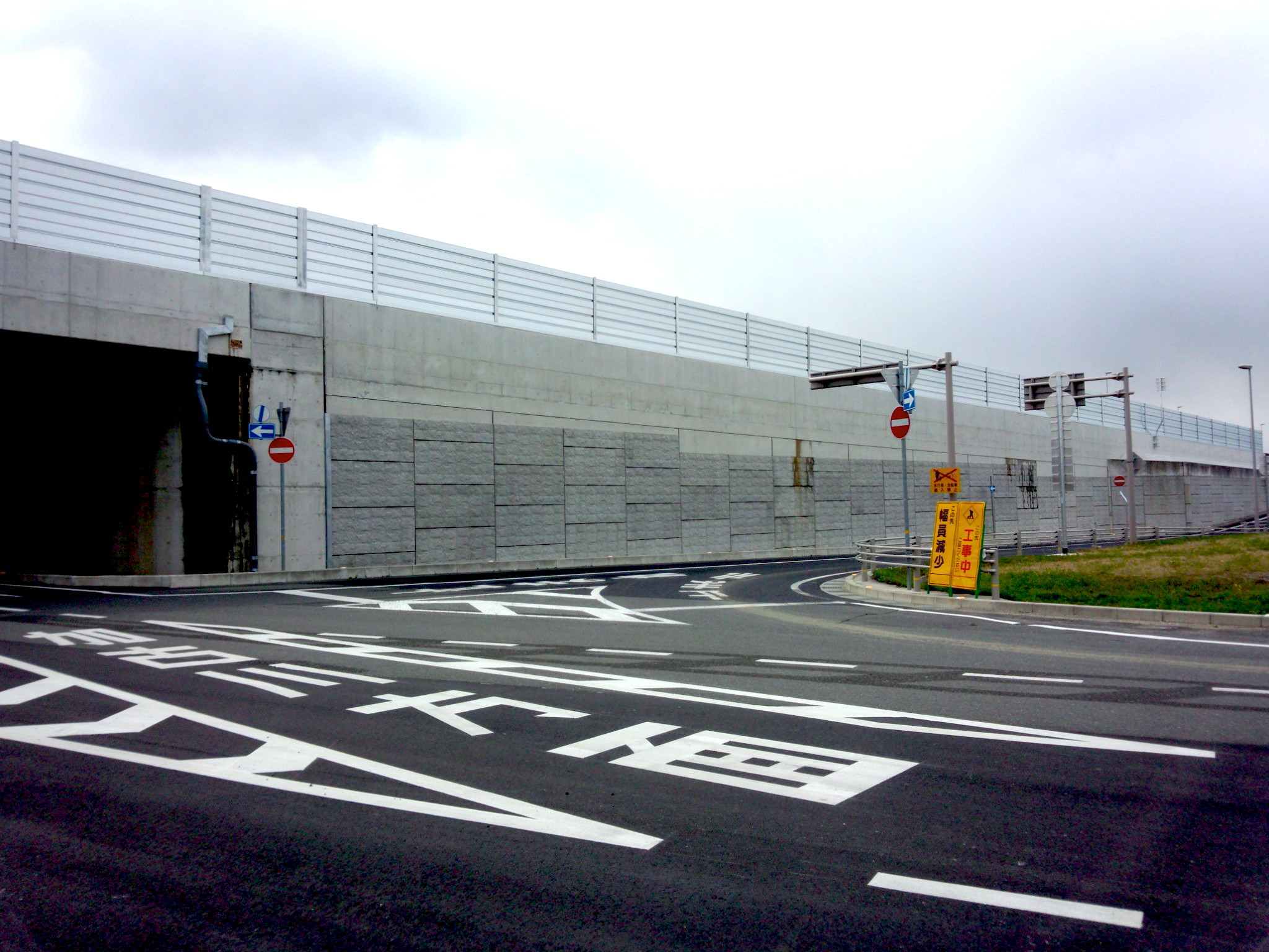 県立加古川医療センターランプ